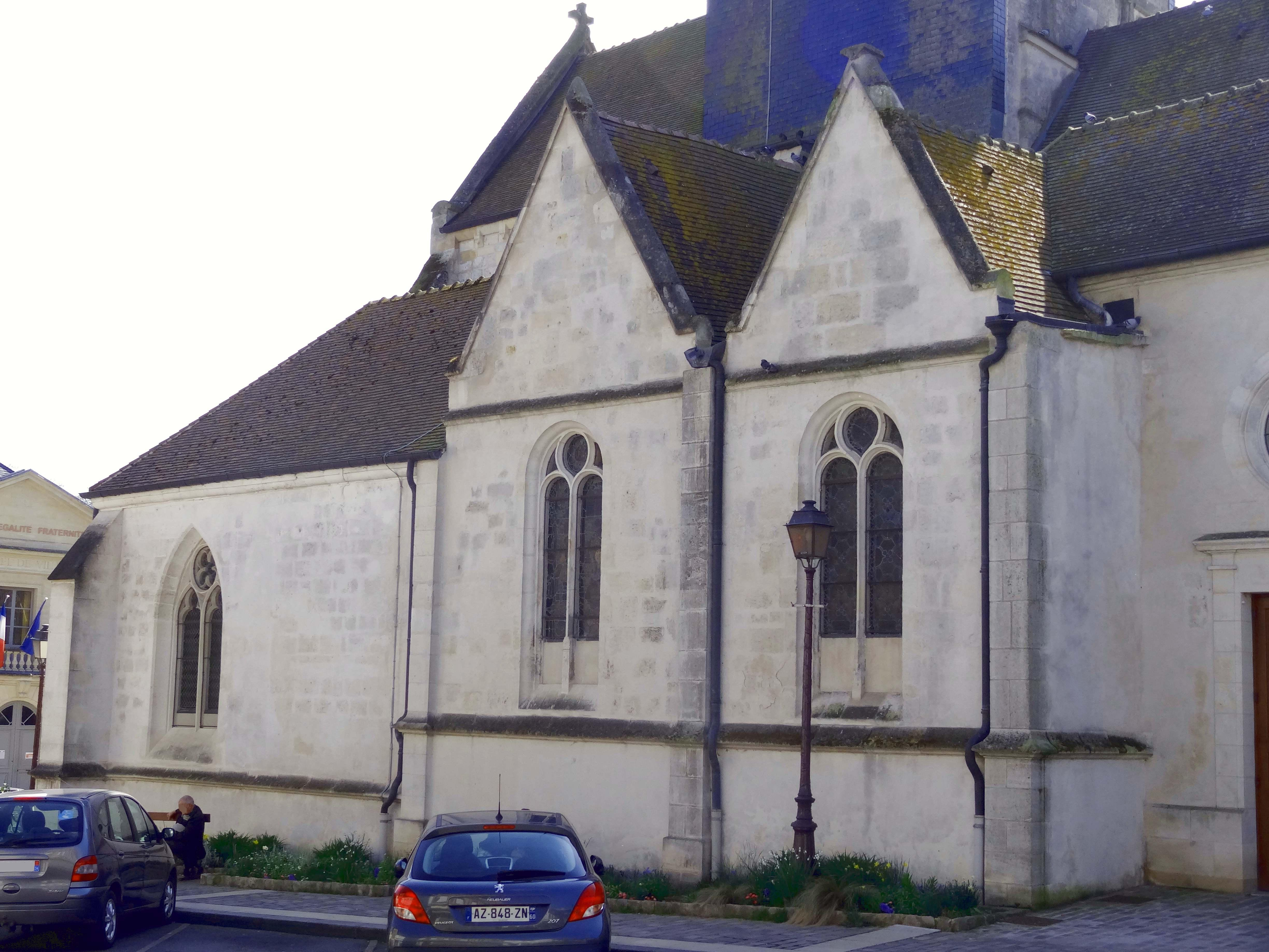 Église Saint-Lucien de Méru - voir titre.